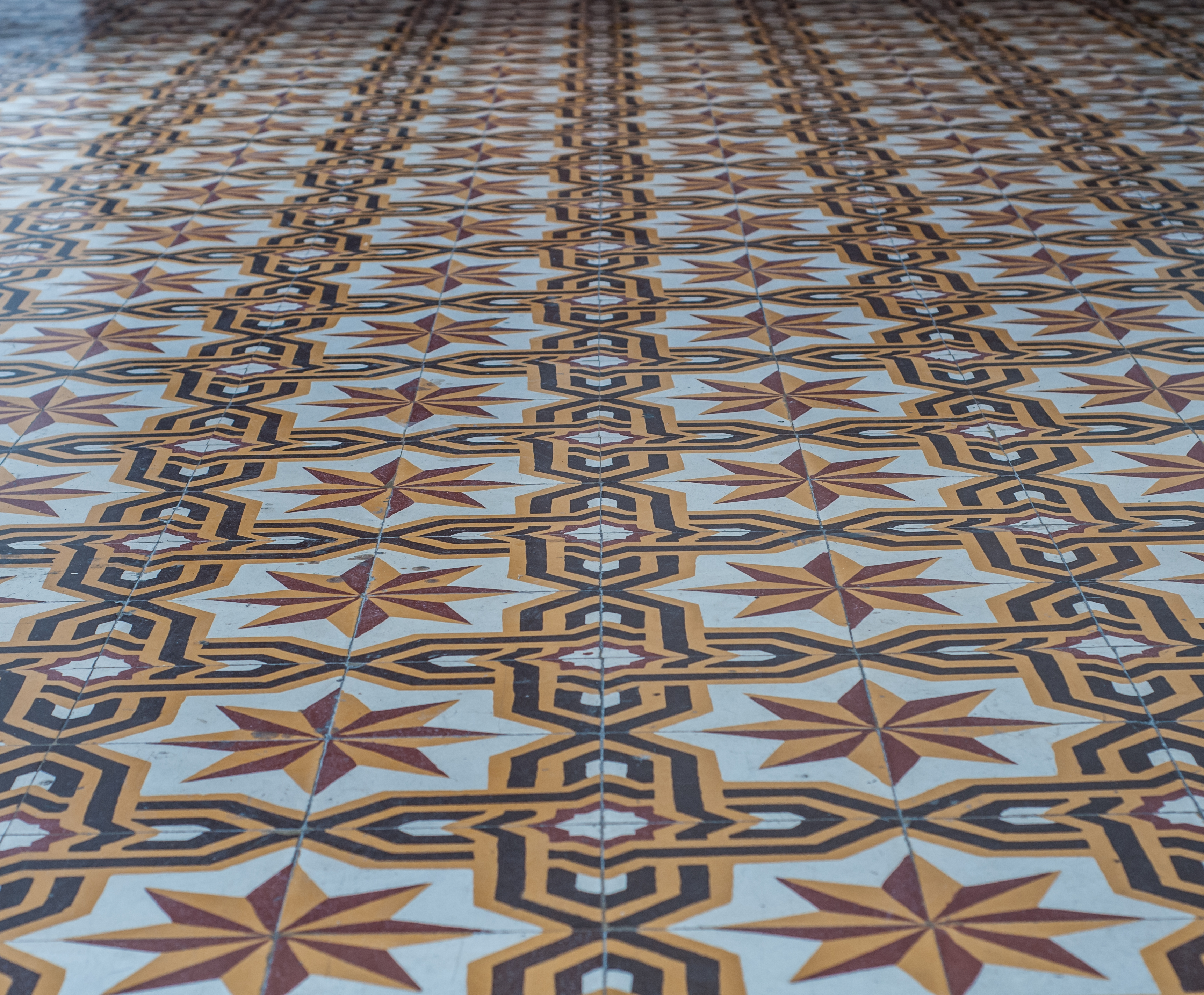 Piso de mosaicos del Palacio de Gobierno de Barquisimeto